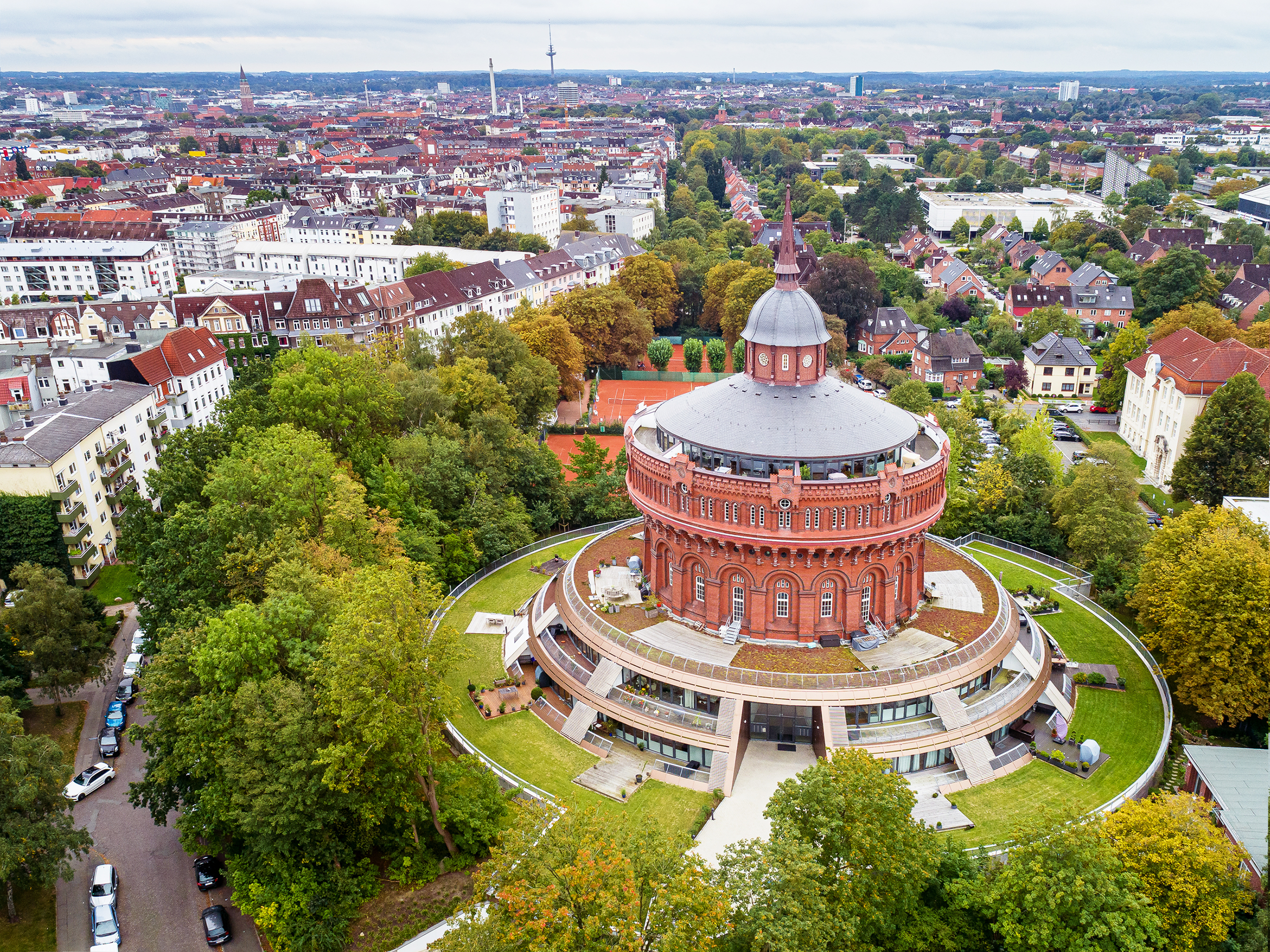 Der umgebaute Wasserturm Ravensberg im Kieler Stadtteil Ravensberg.